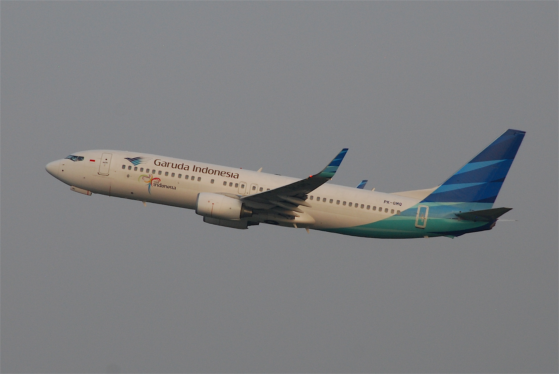 Garuda Indonesia Boeing 737-800; PK-GMQ@SIN;07.08.2011/617bi